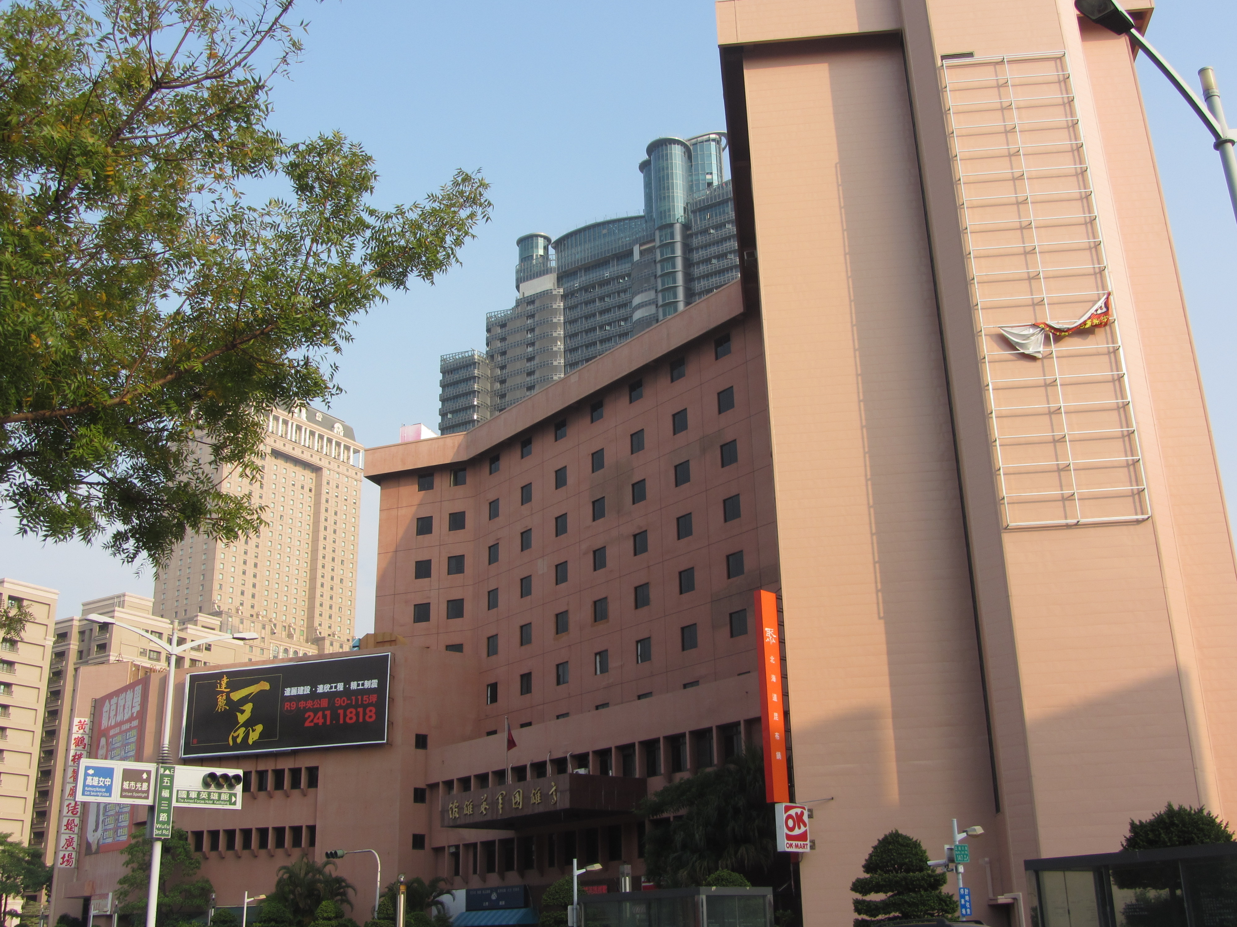 高雄國軍英雄館，位於臺灣高雄市苓雅區五福三路145號